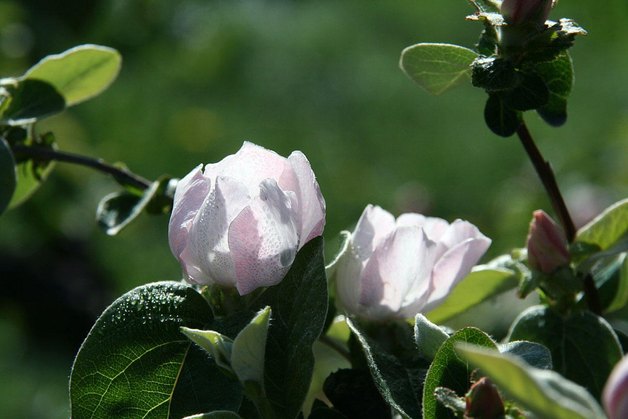 floraison du cognassier